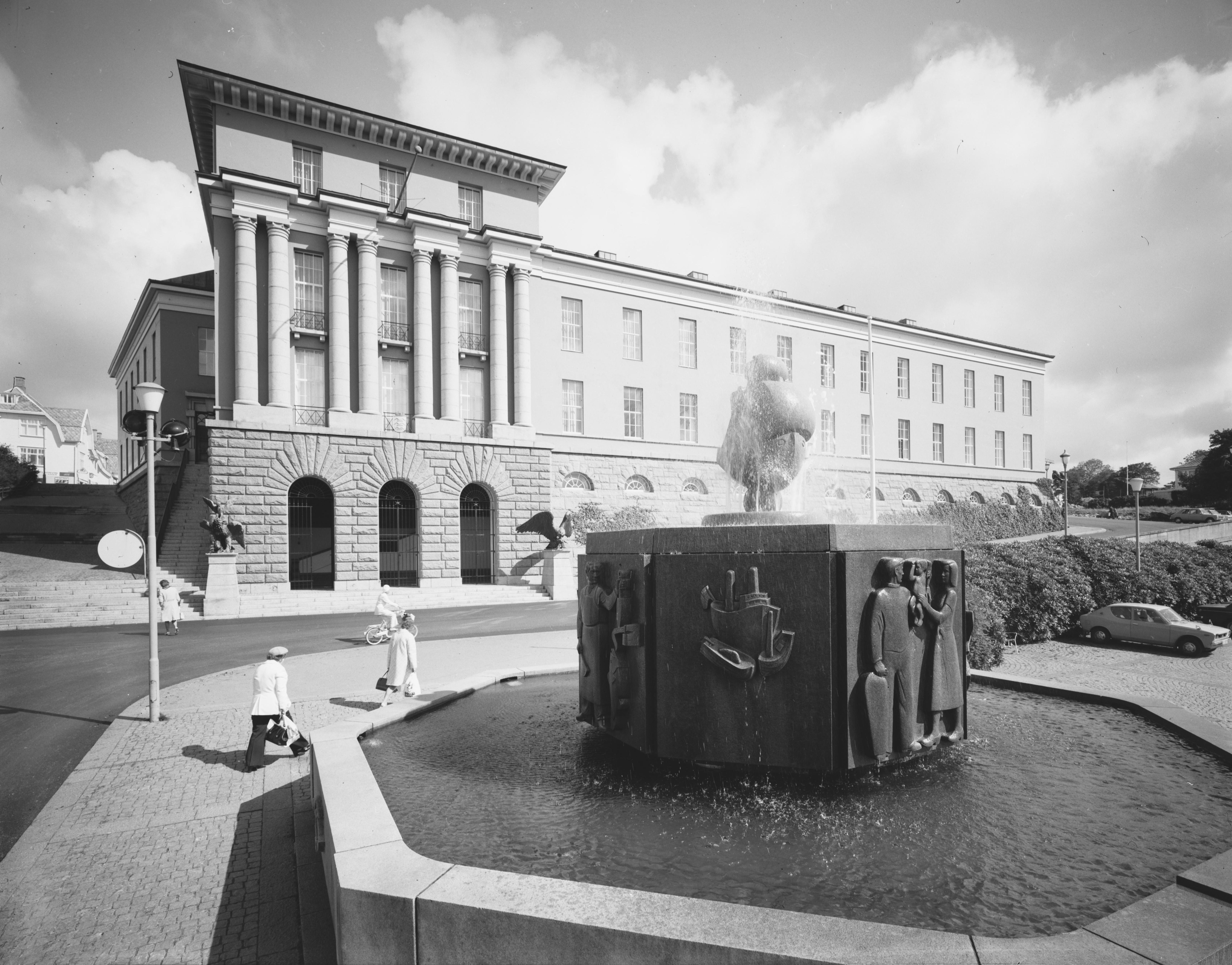 Bildet er hentet fra Nasjonalbibliotekets bildesamling Haugesund, Haugesund, Rogaland